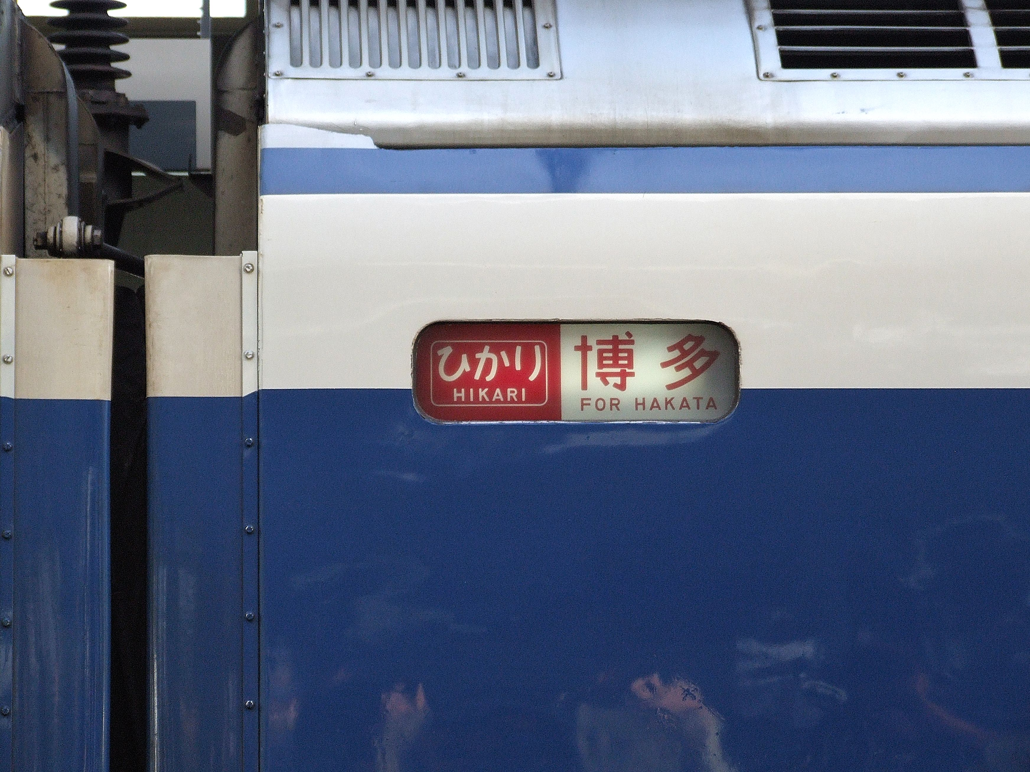 Own work